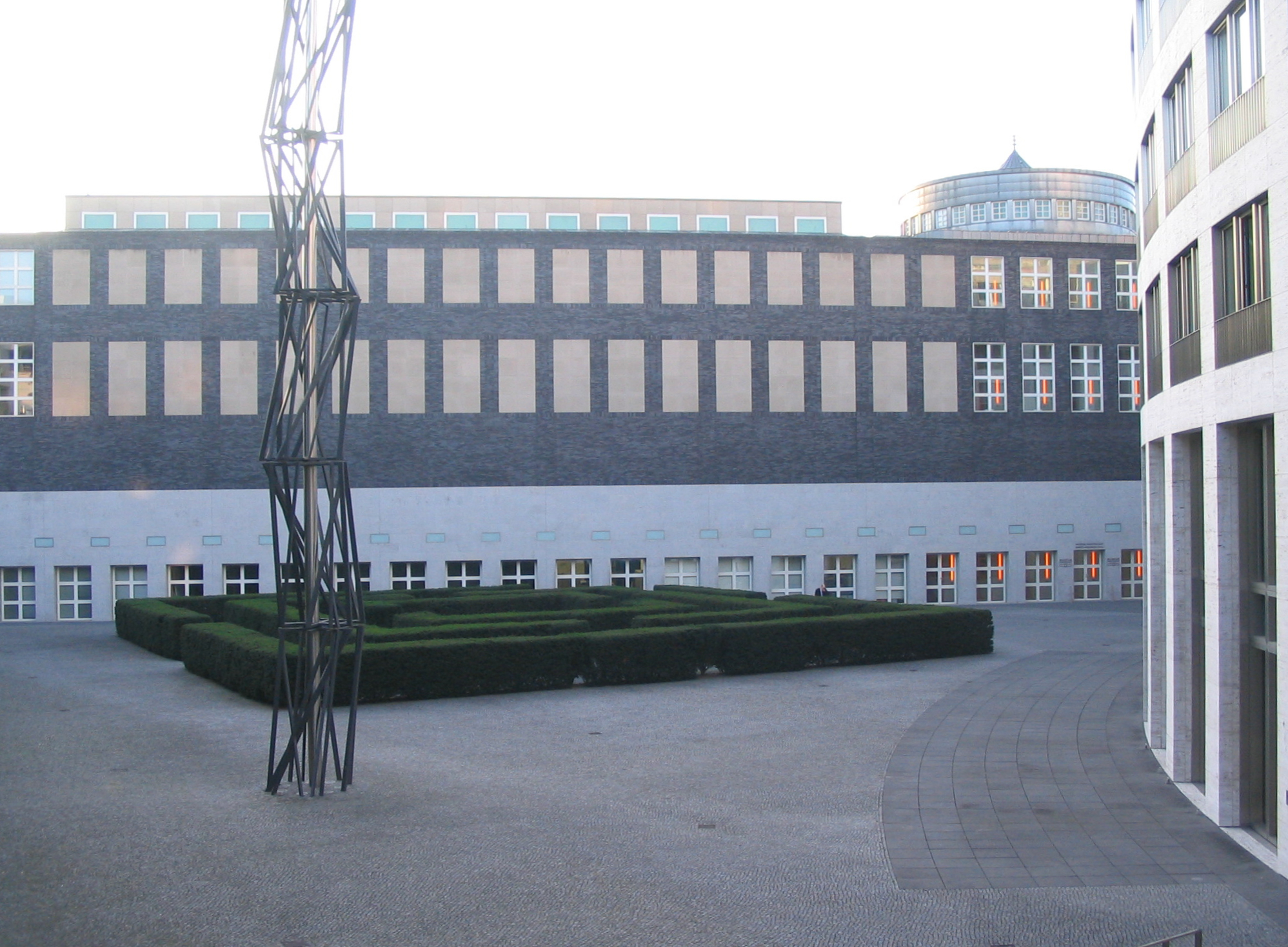 E·On Düsseldorf, Heckenlabyrinth und Stahlplastik, im Hintergrund das Kunstmuseum Düsseldorf mit Robert-Schumann-Saal. 16 Meter hohe Edelstahlplastik „Halm“ von Beat Zoderer aus dem Jahr 2005.